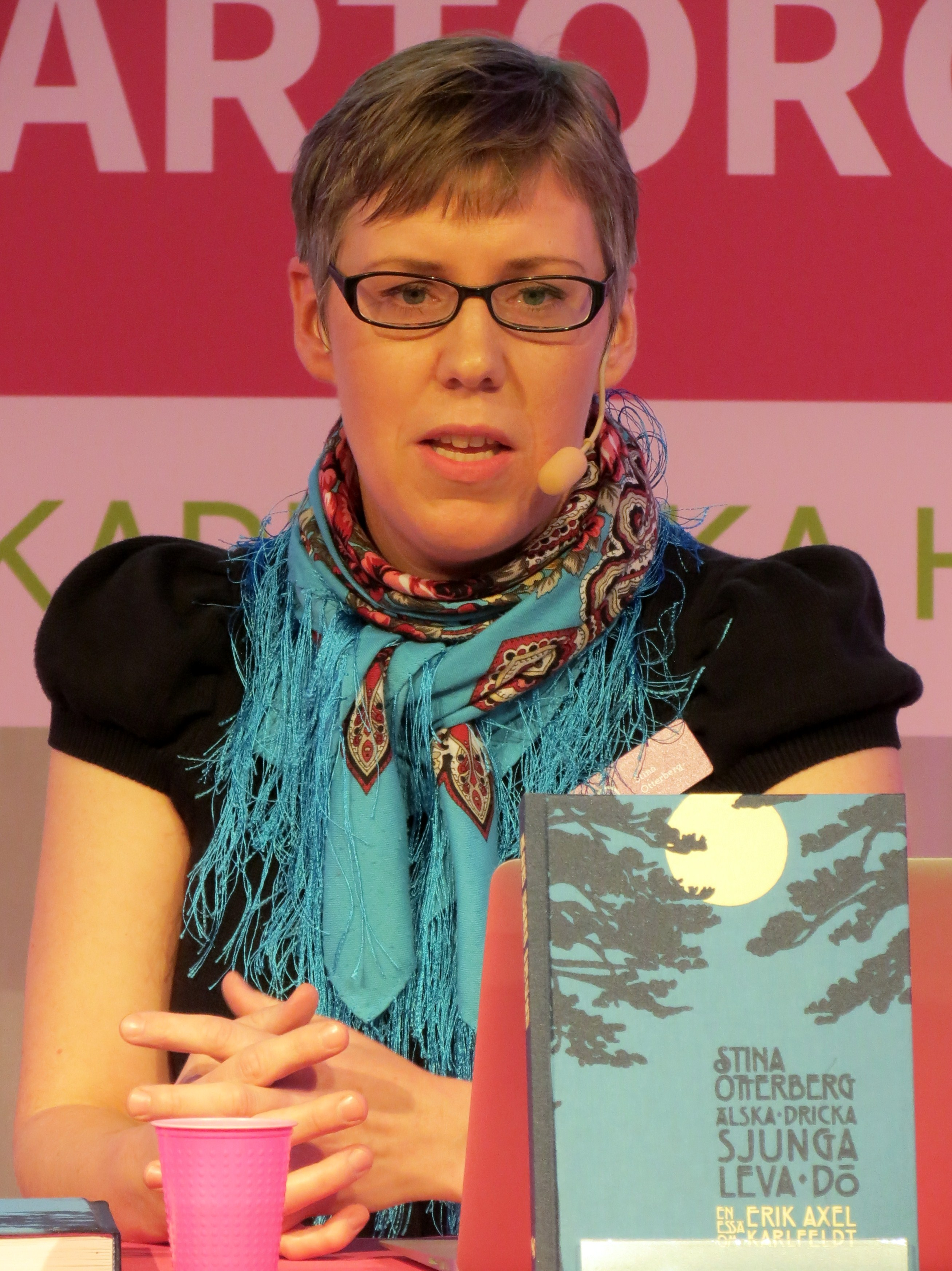 Stina Otterberg, kritiker i Dagens Nyheter, på Bokmässan i Göteborg 2014.